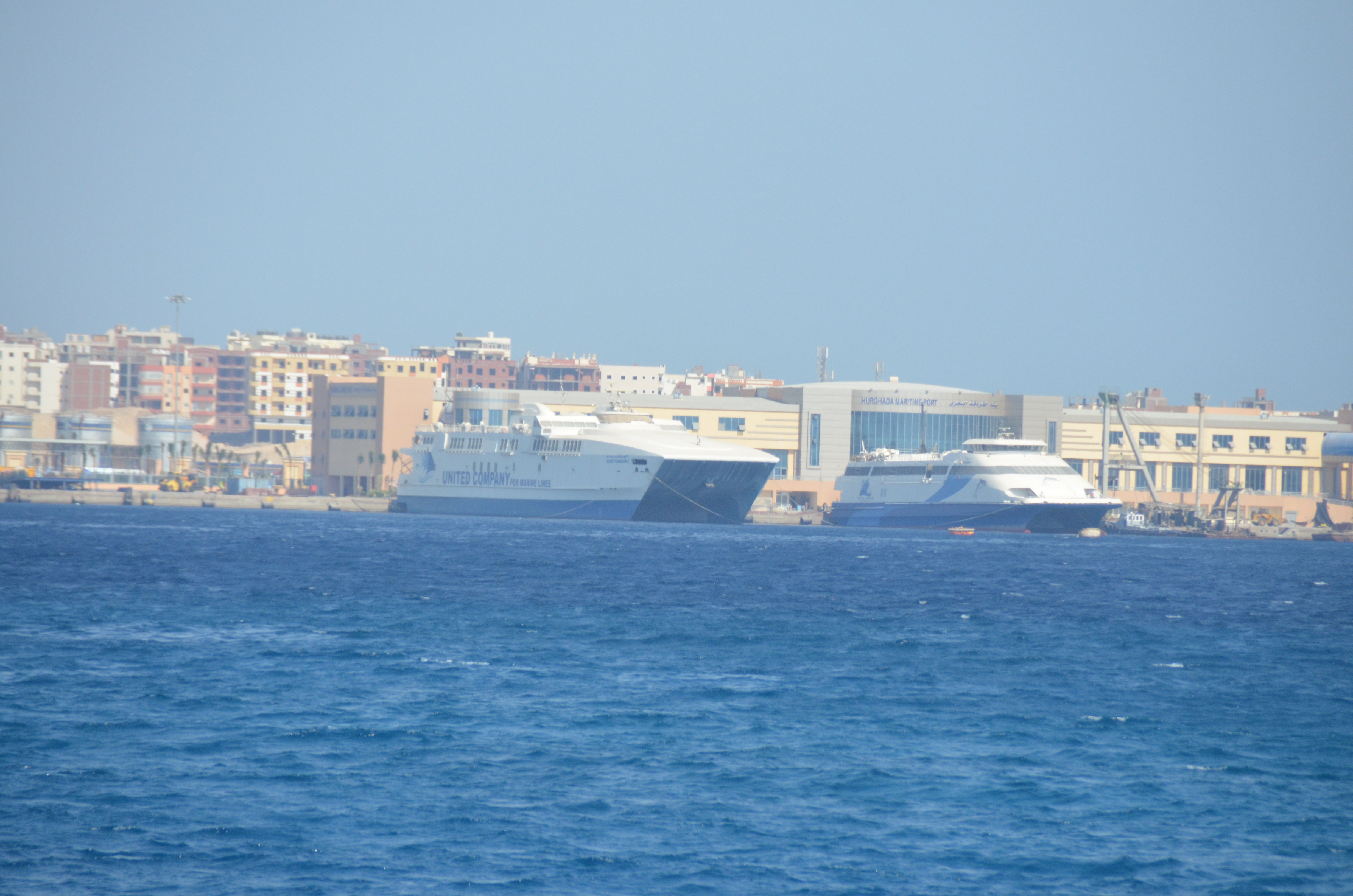 ساحل الغردقة